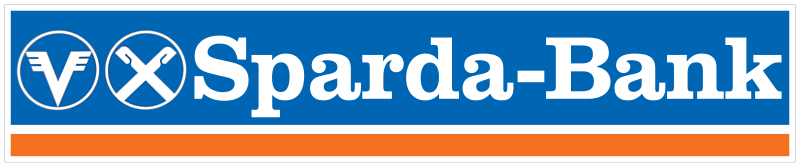 Logo der Sparda-Bank (Deutschland) (bis 2003) mit Logoelementen der Volksbanken und Raiffeisenbanken